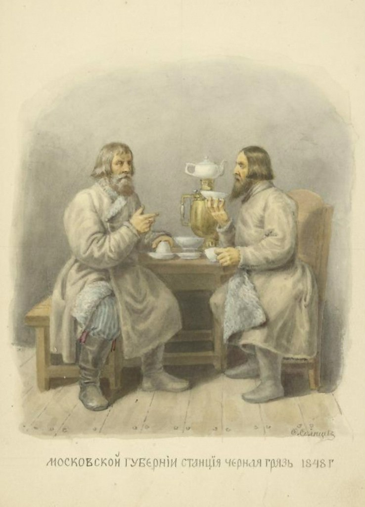 Солнцев Ф. Г. Московская губерния, станция Чёрная Грязь, 1848 год. «Одежды Русского государства».